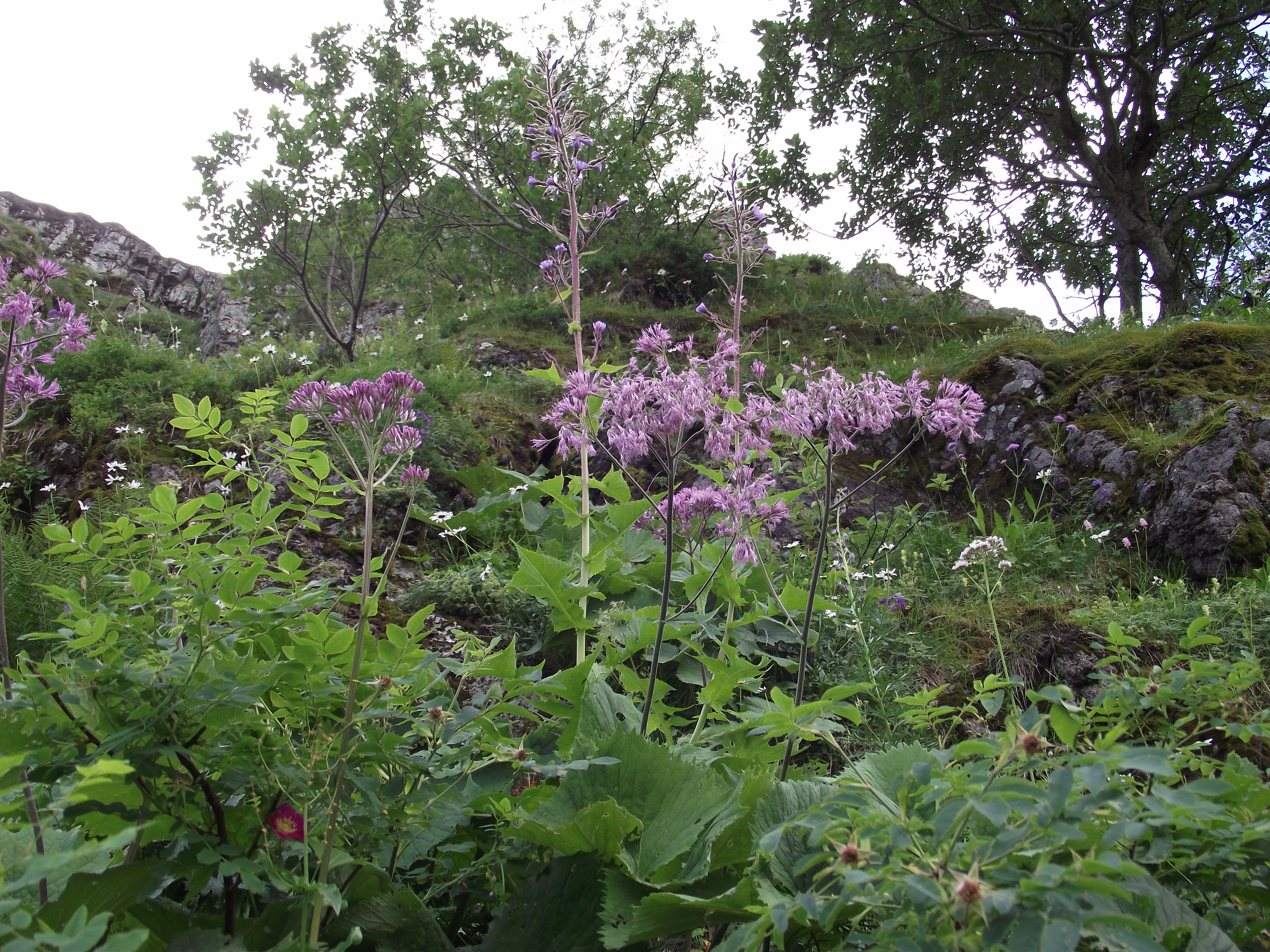 Mégaphorbiaie dans les monts du Cantal. On reconnaît Cicerbita alpina et Adenostyles alliariae.